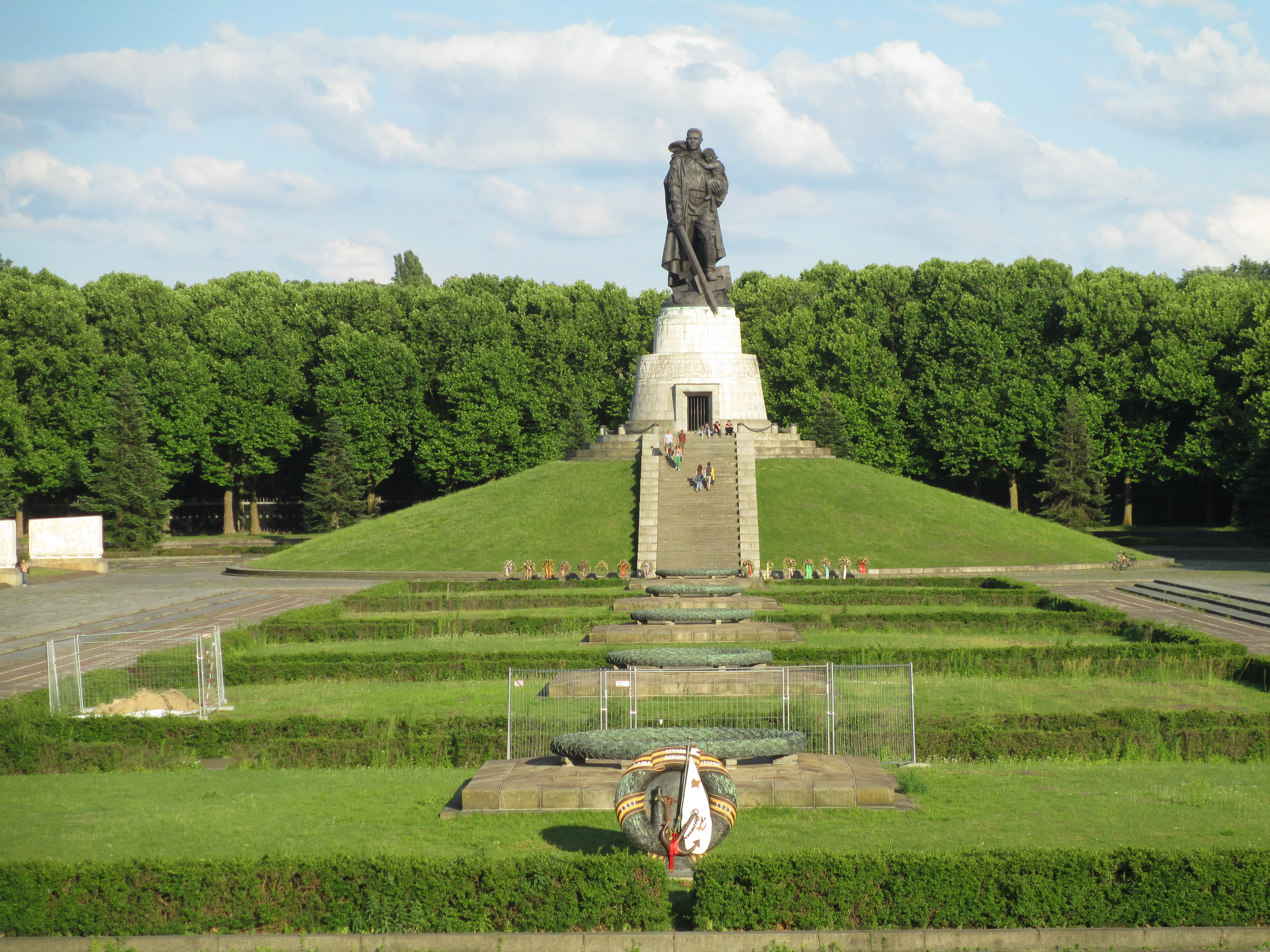 אנדרטת המלחמה הסובייטית בפארק טרפטו